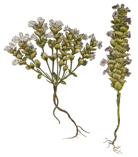 Euphrasia ramosa pratensis flore albo and Euphrasia minus ramosa flore ex caeruleo purpurascente.